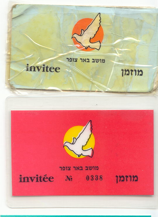 כרטיסים משנת 1994 לכניסה לשטחי המובלעת באדיבות ארכיון מושב צופר